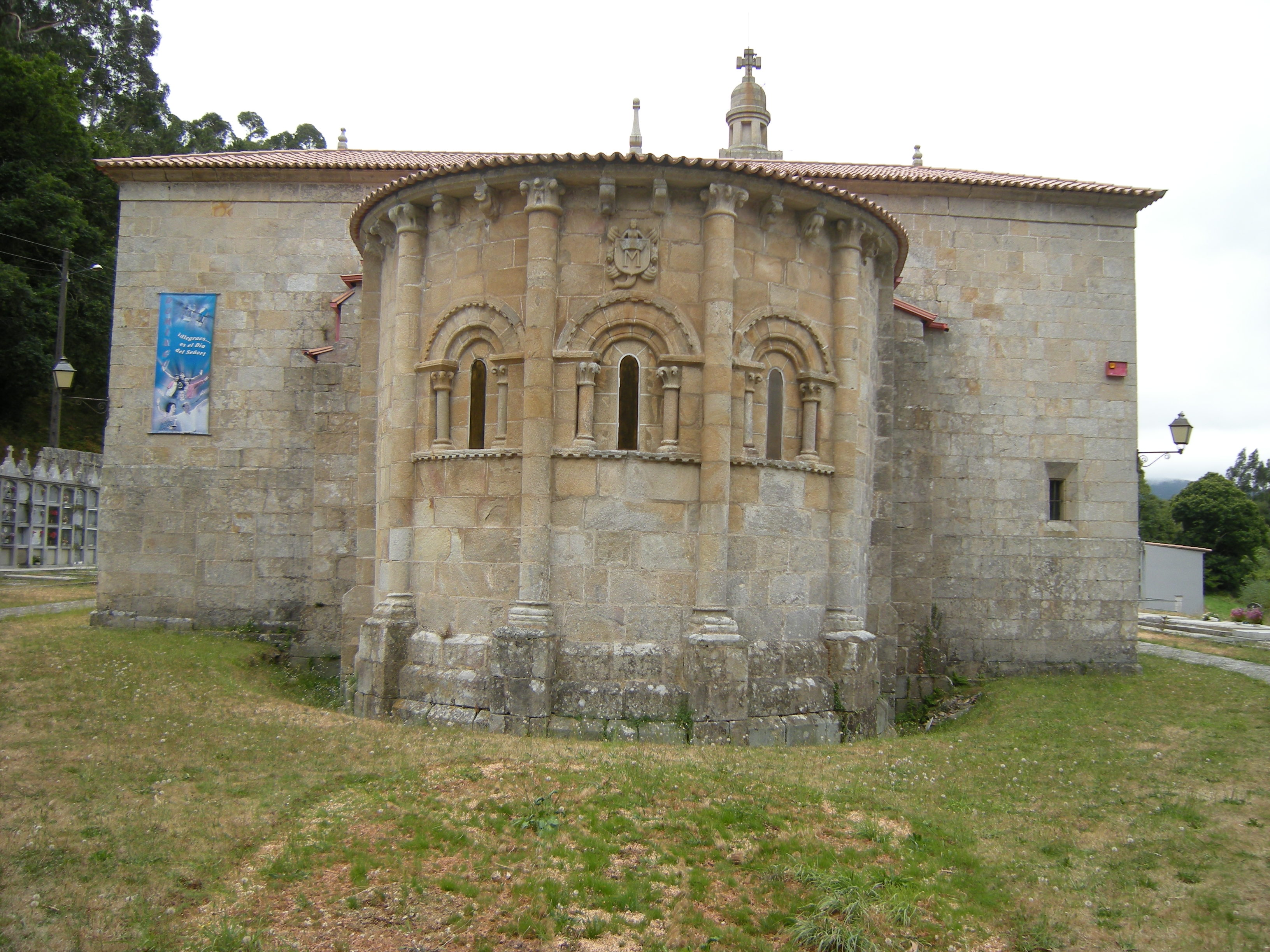 Igrexa de Santo André de Cesar, Caldas de Reis